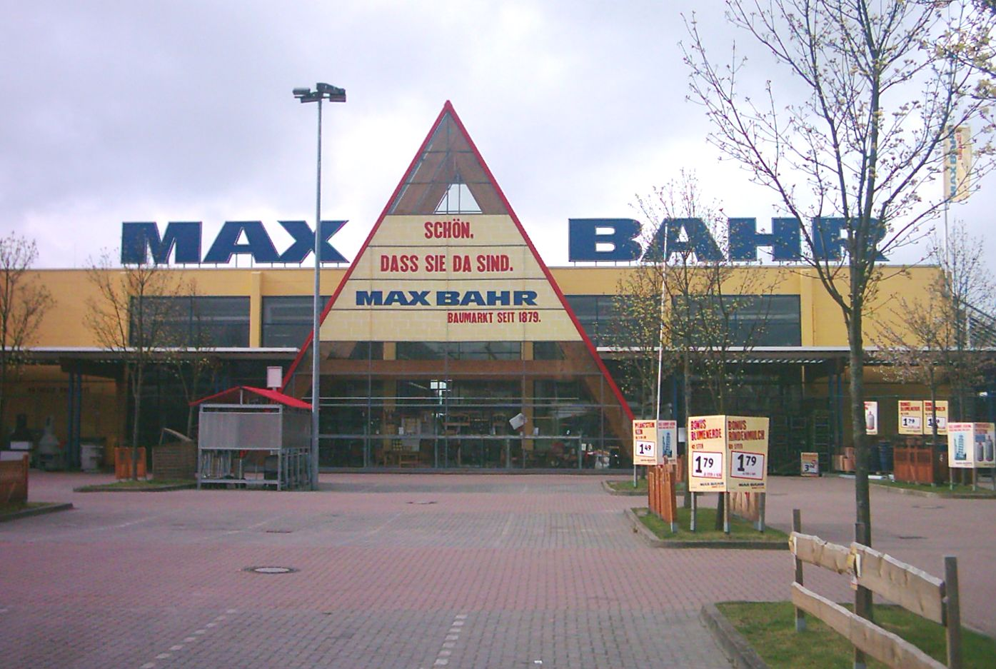 Max Bahr-Filiale Hamburg-Neugraben-Fischbek.